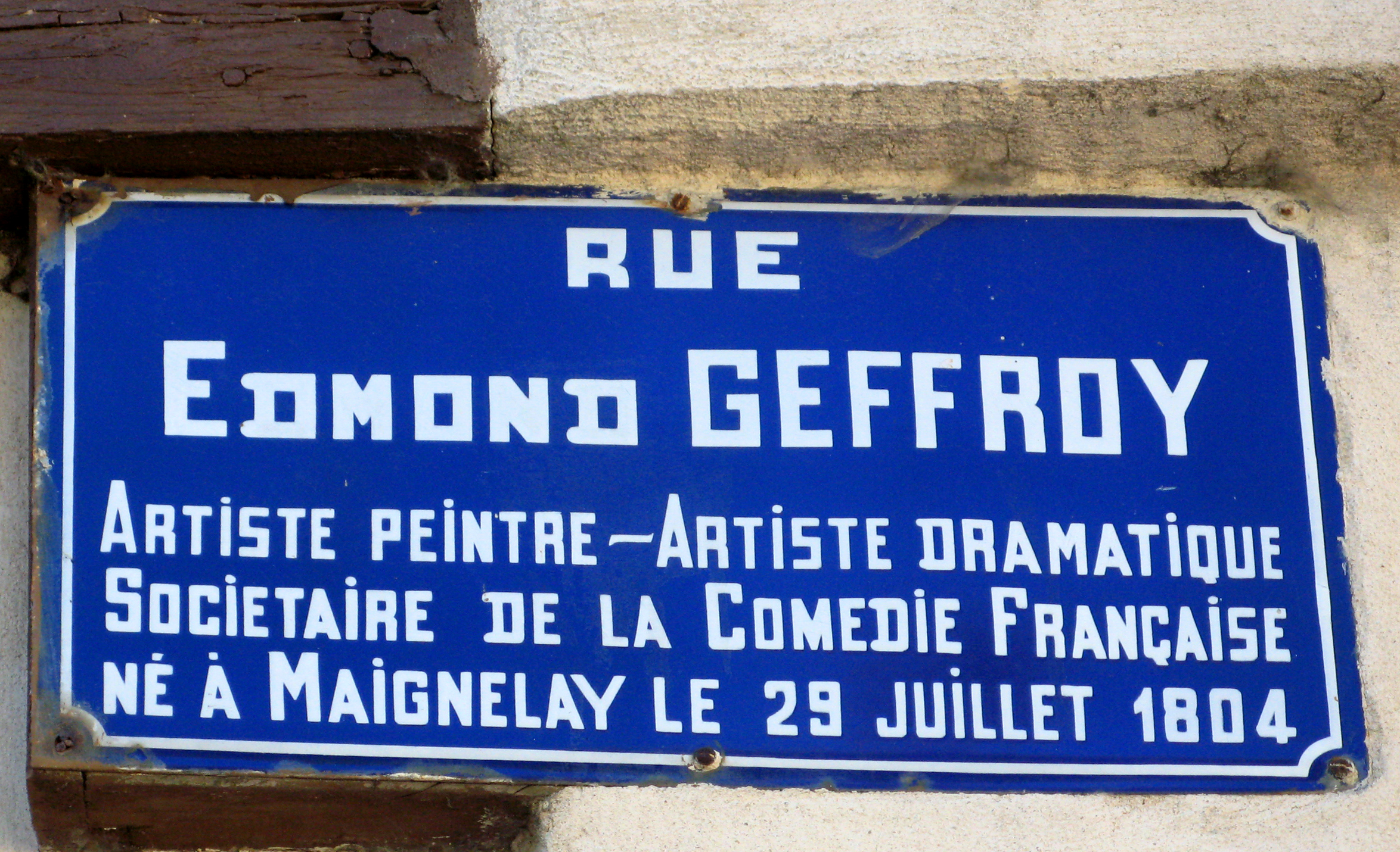 Maignelay-Montigny (Oise, France) - Plaque de rue en la mémoire d'Edmond Geffroy, à Maignelay. . .